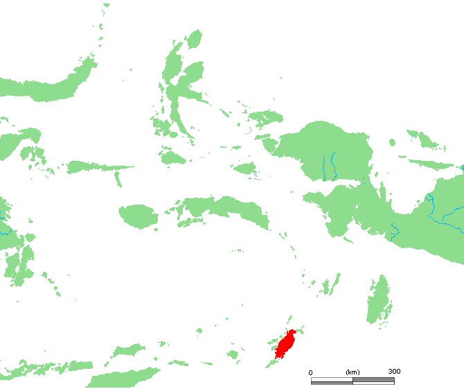 ID Yamdena.PNG